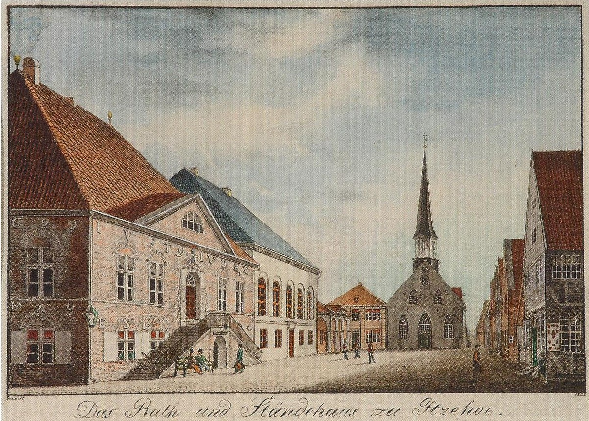 Kolorierte Lithographie: „Das Rath- und Ständehaus zu Itzehoe“